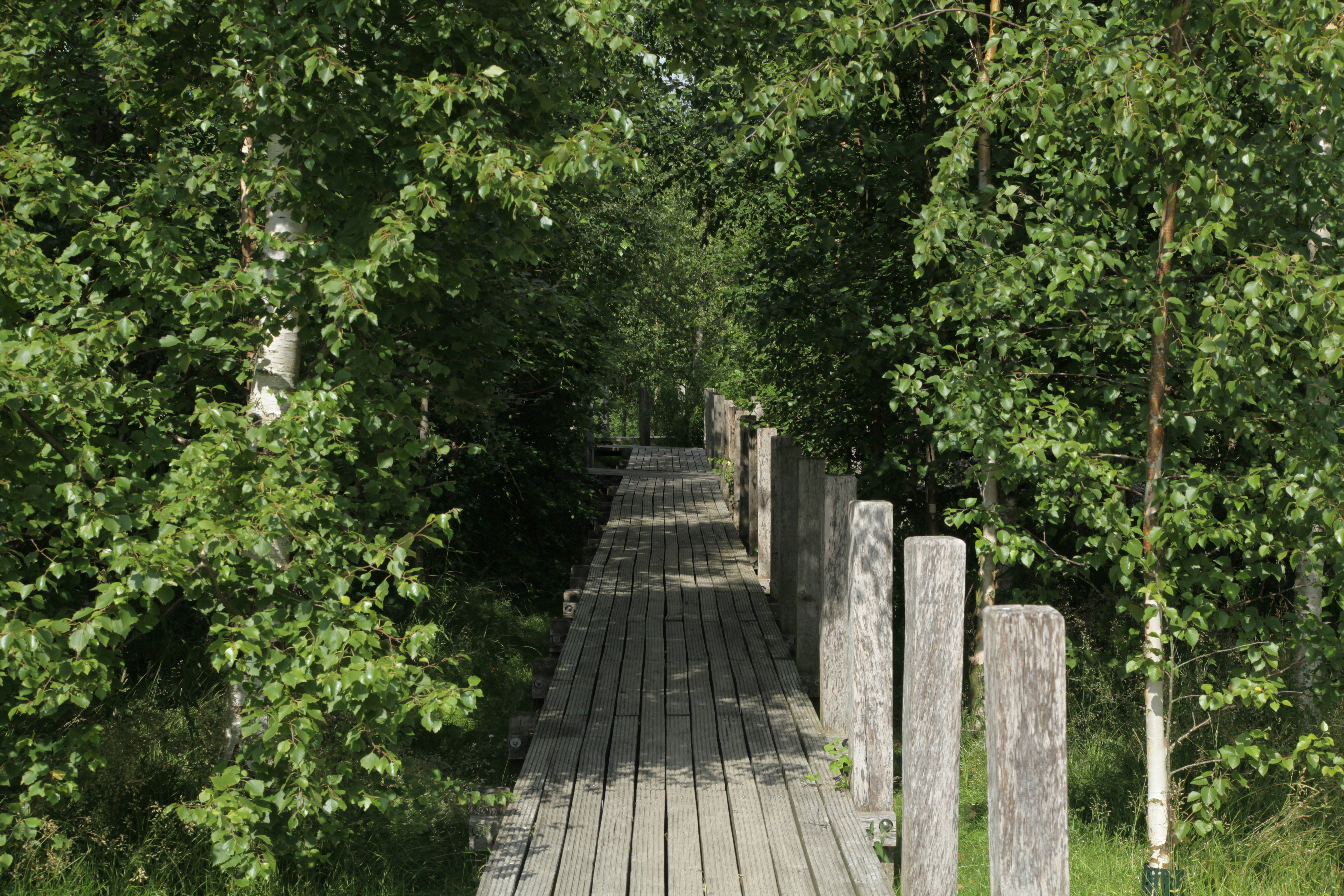 Königswiesen in Schleswig